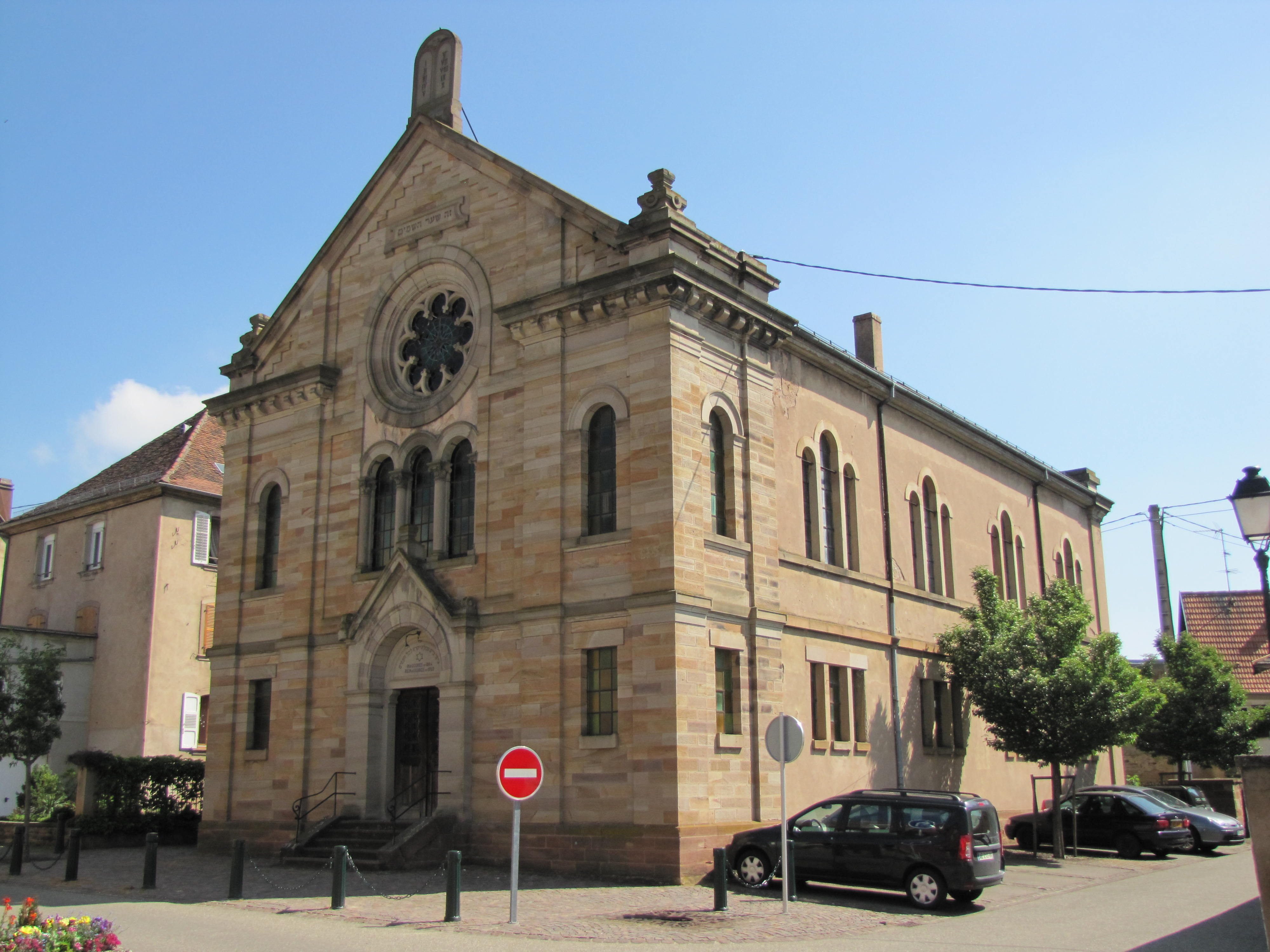 Alsace, Bas-Rhin, Rosheim, Synagogue (1884), rue du Général-de-Brauer